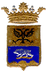 Escudo de Armas del Marquesado de Paul, titulo nobiliario español creado por el Rey Felipe III por Real Cédula dada en Madrid el 29 de enero de 1619 a favor de D. Antonio de Tassis quien fuera Consejero del Virrey del Reino de Napoles y Correo Mayor en la corte de Roma a título perpetuo para él y sus descendientes por orden el Rey Felipe III dada en El Pardo, el 20 noviembre de 1617, a quien sirviera en el ejercito español y heroicamente en la guerra de Flandes.